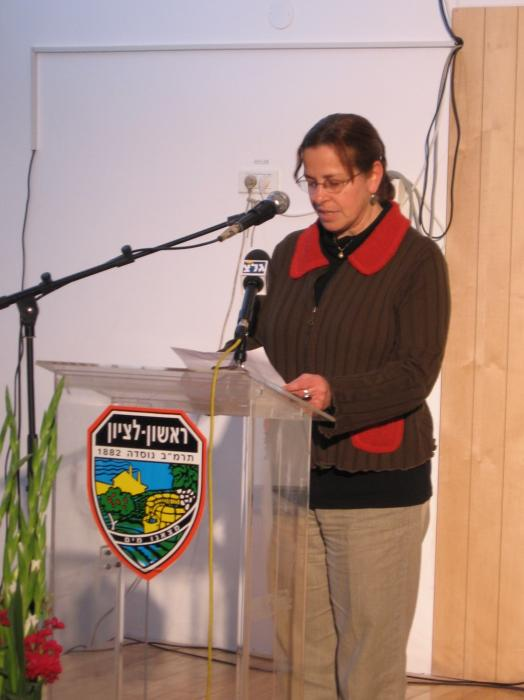 ערב פתיחת התערוכה "כשהכריש והדג נפגשו לראשונה" על פי ספרו של גלעד שליט בספרייה "כותר שקמה" בראשון-לציון. בתמונה: אביבה שליט, אמו של גלעד נושאת דברים.